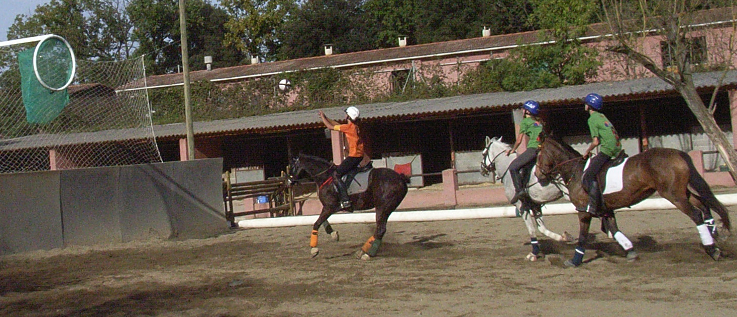 atac en solitari amb persecussió